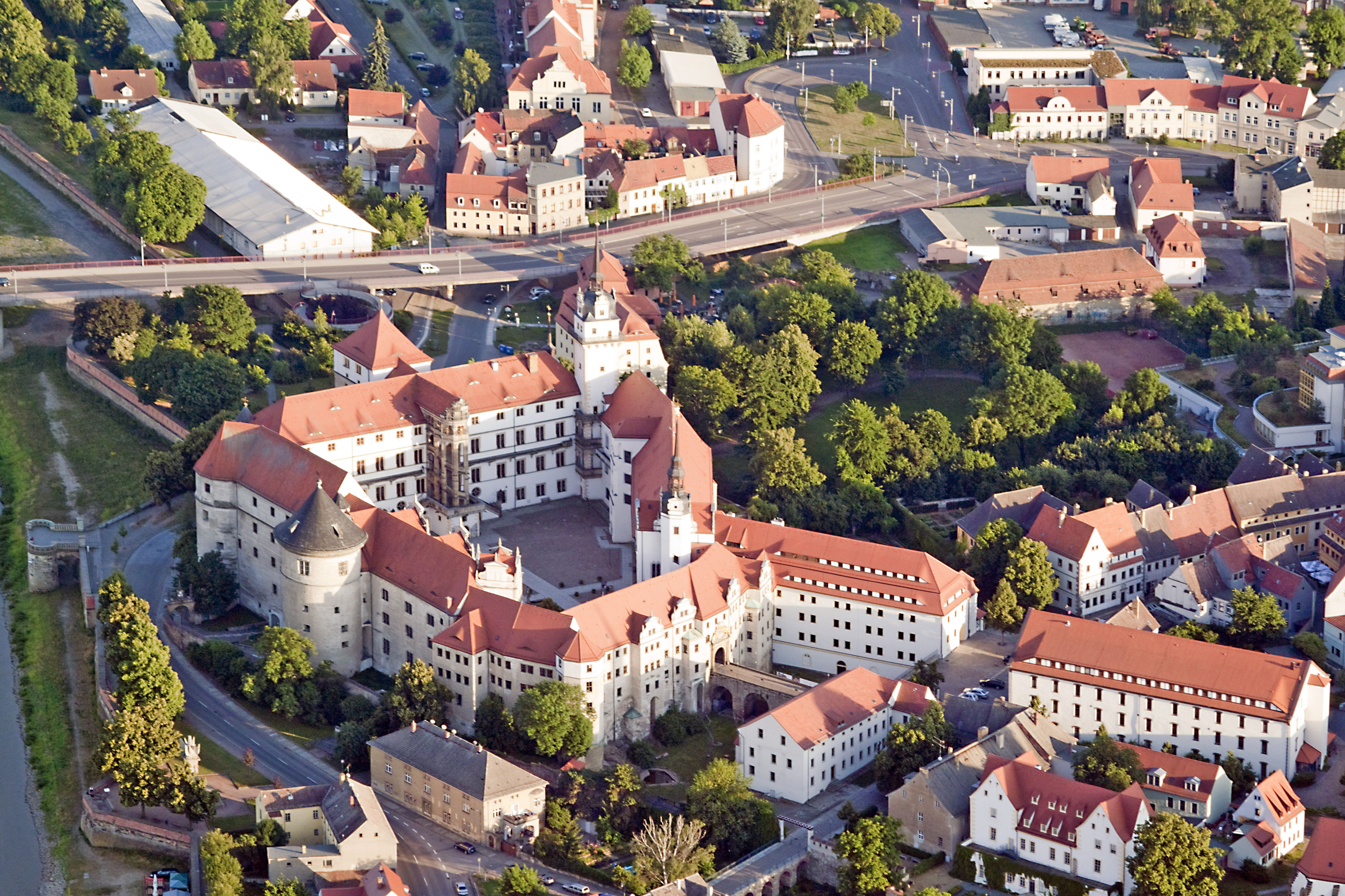 Luftaufnahme Schloss Hartenfels Torgau